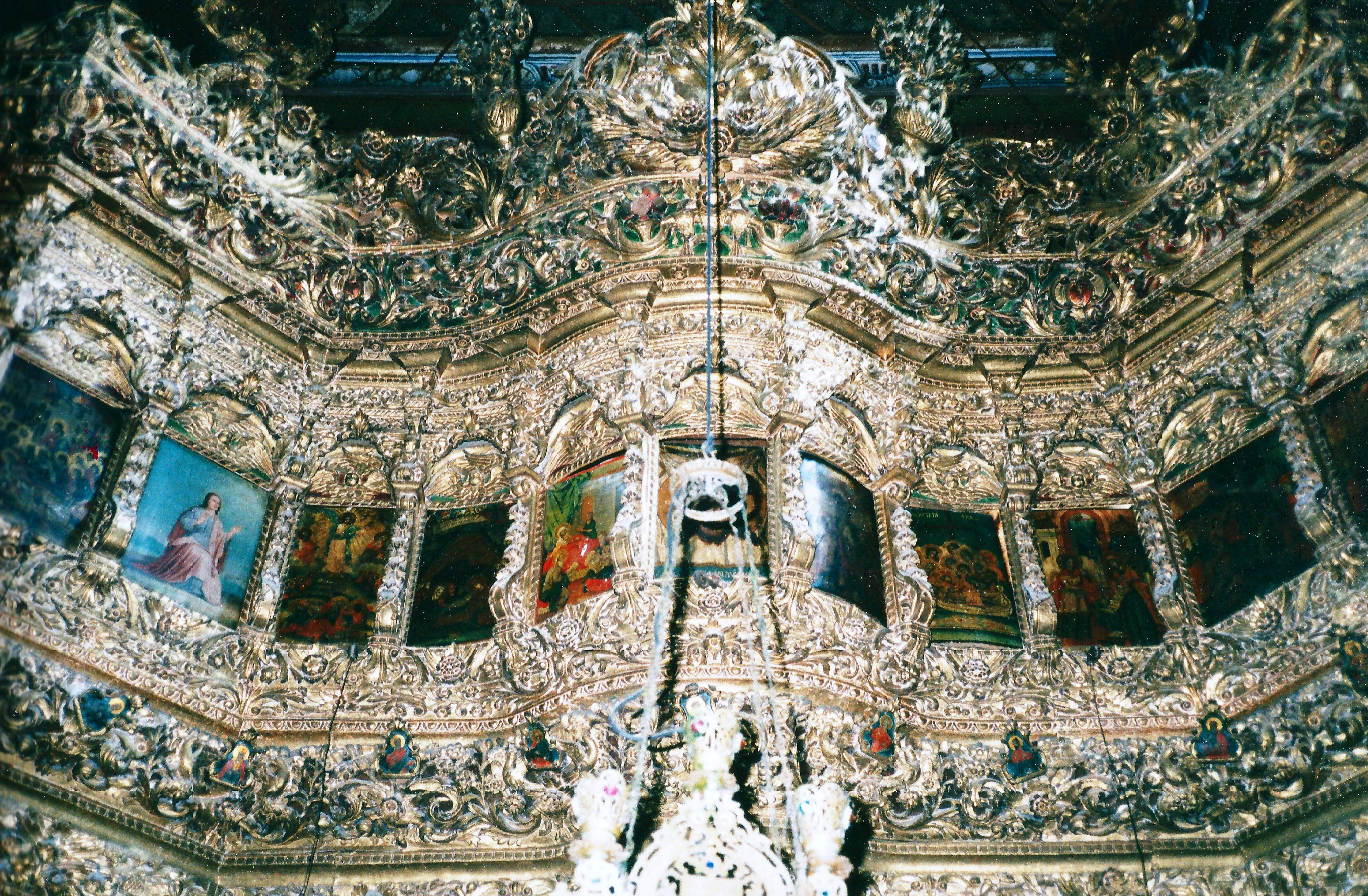 Μονή Ταξιαρχών Λειμώνος στα Δάφια«Μονή Ταξιαρχών Λειμώνος στα Δάφια»